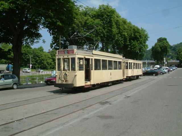 Le Tram touristique au terminus de la Ville Basse de Thuin Motrice standard 10308 et remorque 19220 (SNCV) Photo personnelle Serow 12 juin 2007 à 21:57 (CEST)